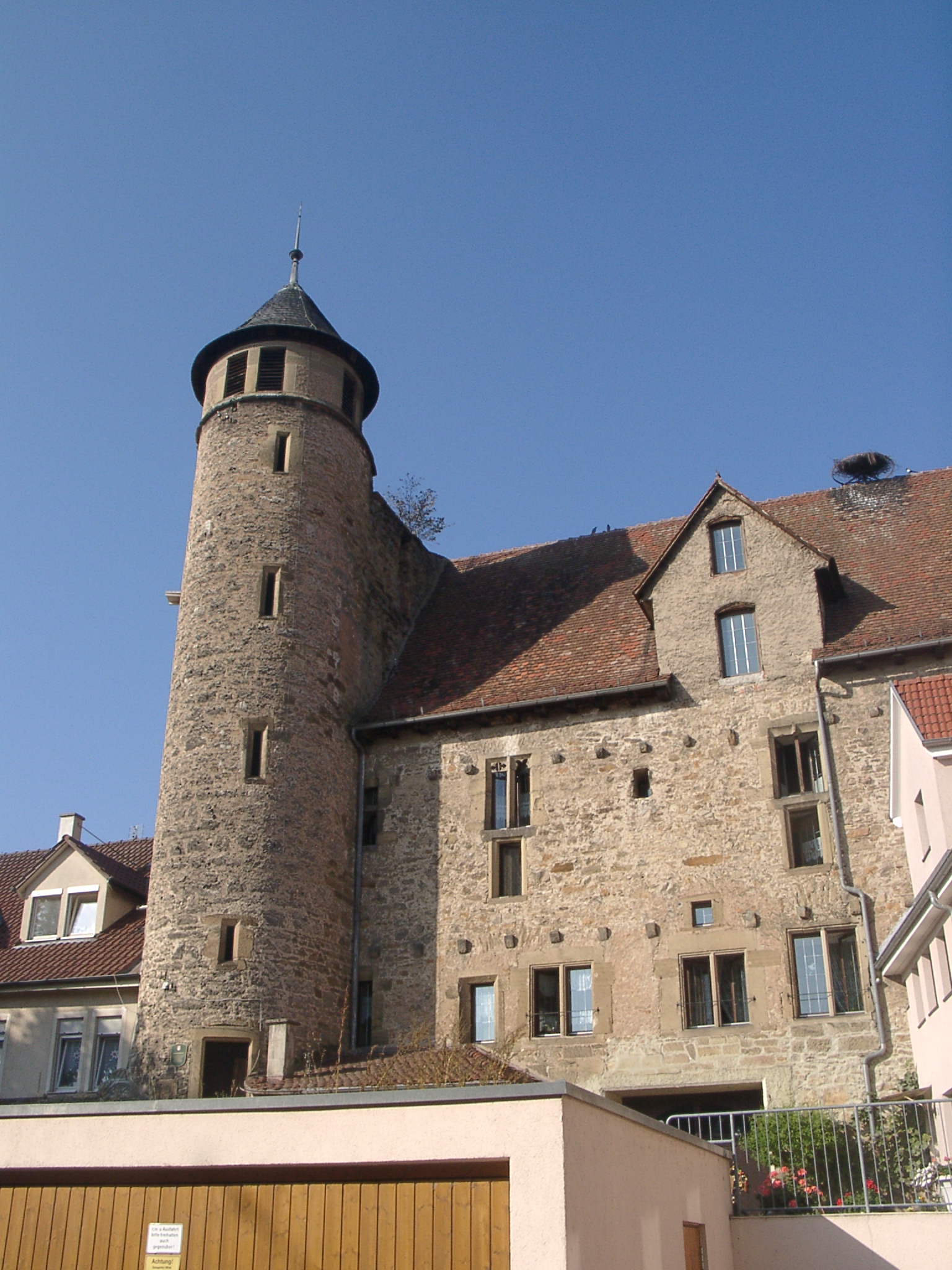 Ganerbenburg Bönnigheim